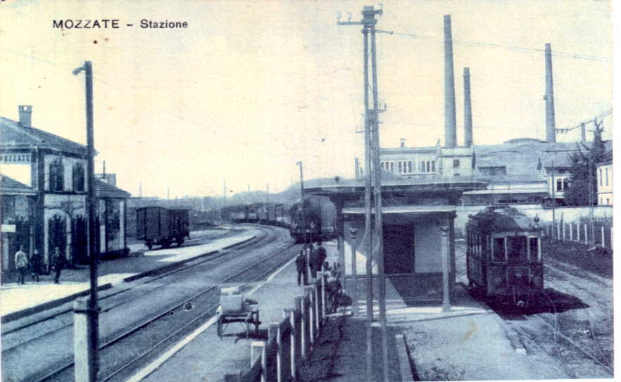 Stazione ferroviaria di Mozzate. A destra la tranvia per Como.